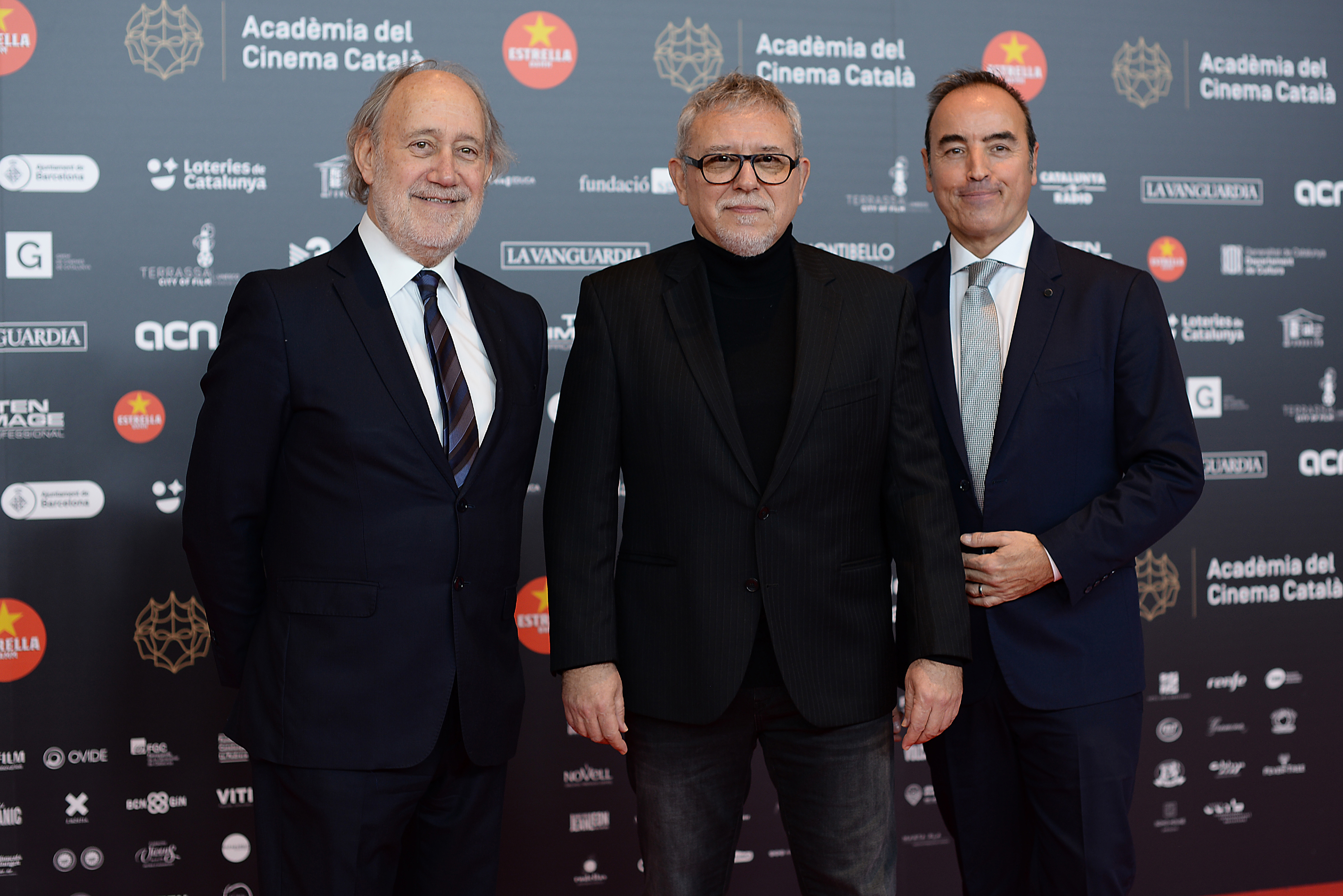 Jaume Banacolocha, productor executiu; Jordi Frades, director, i Oriol Sala Patau, productor (La catedral del mar), XII Premis Gaudí (2020)